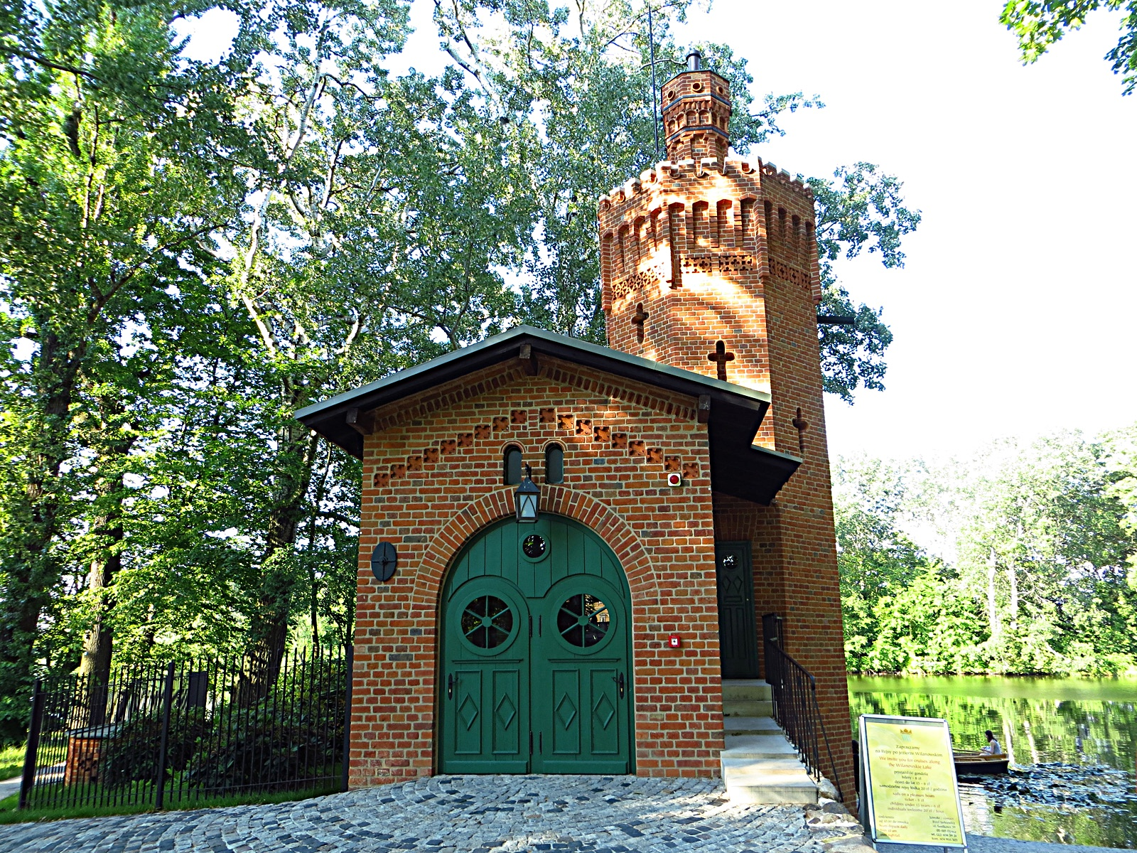 Park Wilanowski